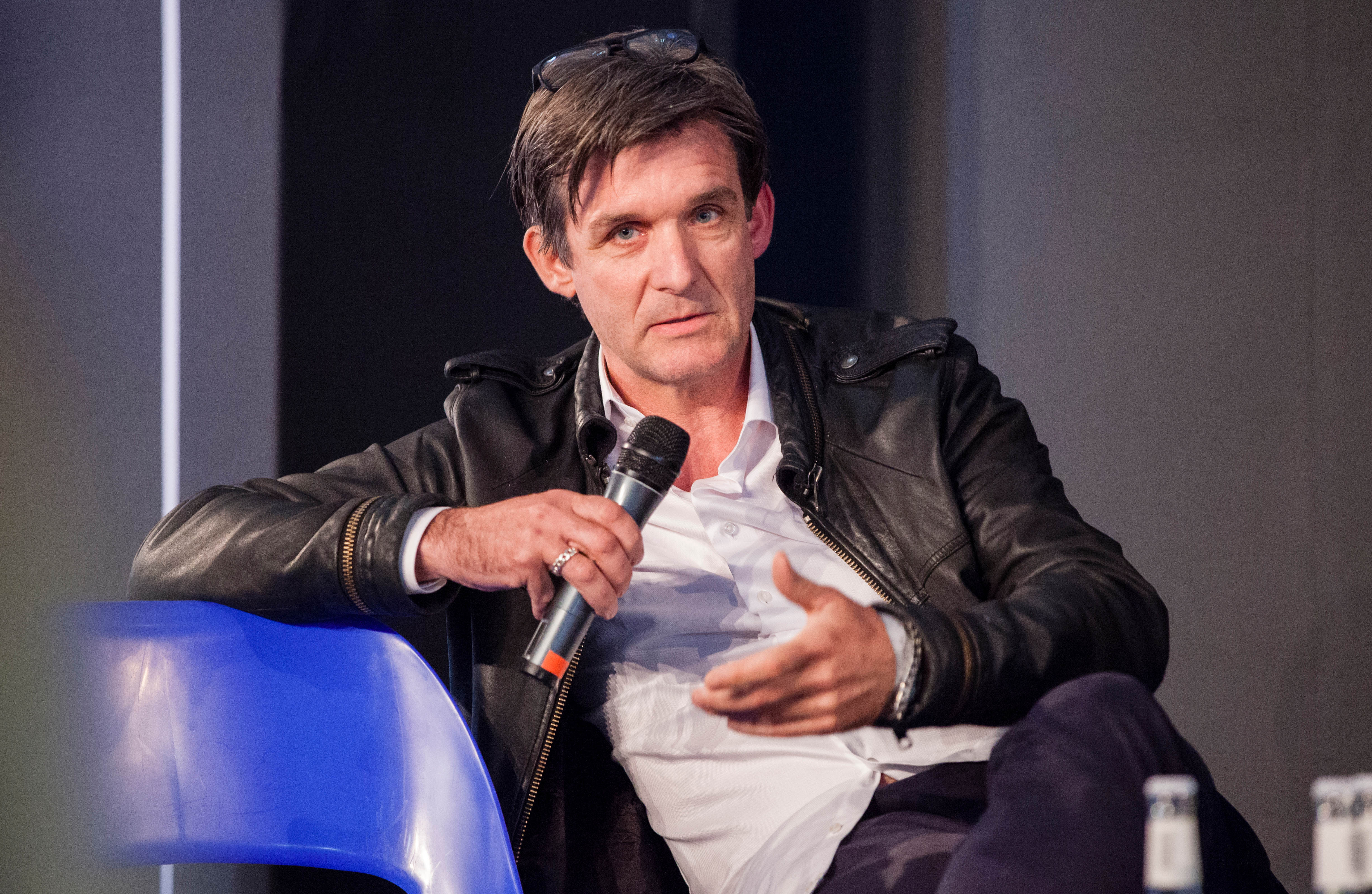 Vanja Steinholtz, Roxanne de Bastion, Horst Weidenmüller, Inken Bornholdt und Eric Eitel bei "Fish Bowl: Musicday" am 02.05.2016 auf der re:publica in Berlin. Foto: re:publica/Jan Michalko CC BY 2.0